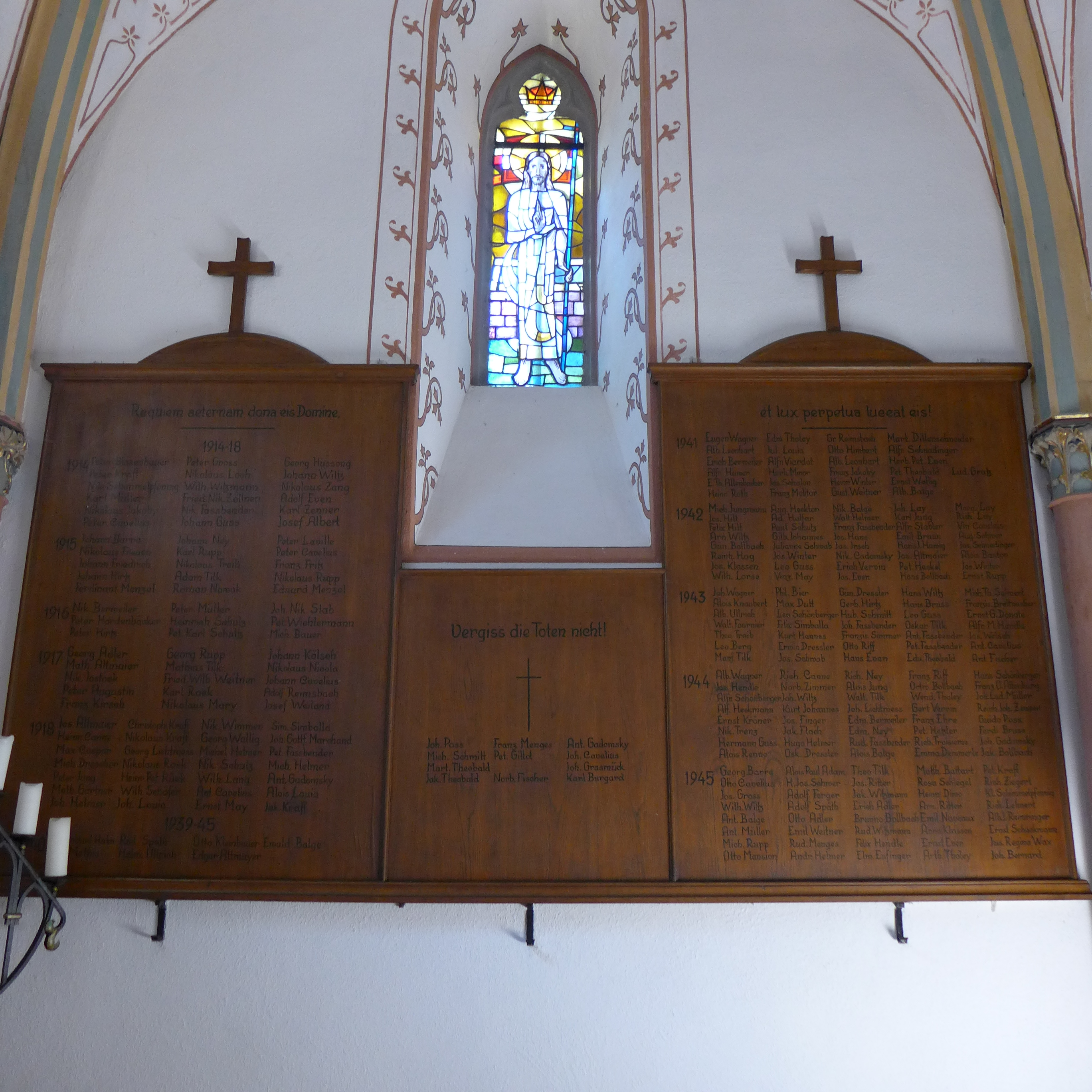 St. Katharina (Wallerfangen), Kriegergedenktafel in der Turmhalle